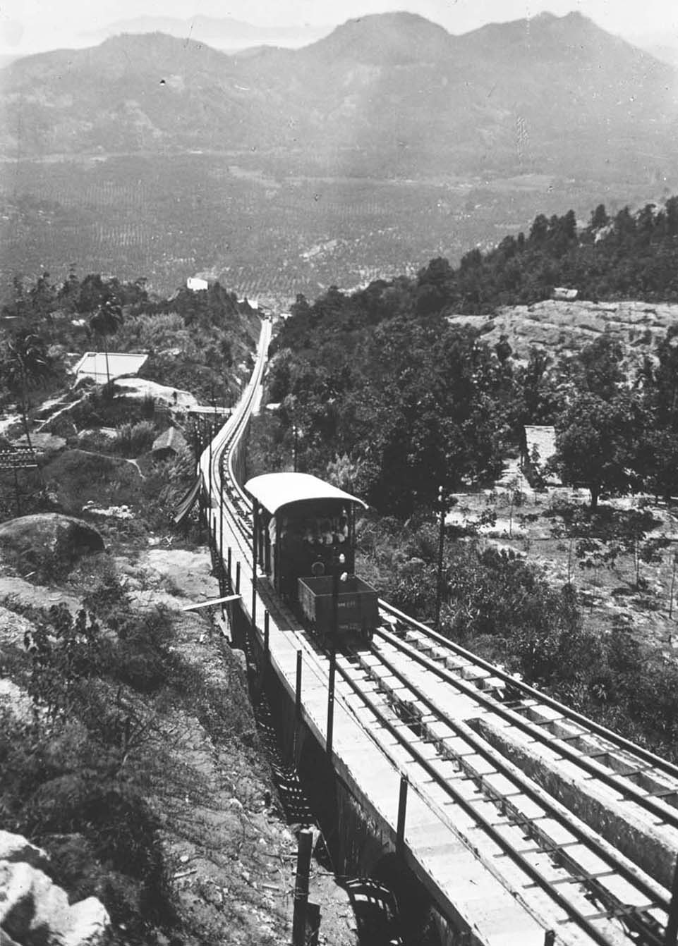 Foto: De volle kabeltrein op het spoor op weg naar hotel Crag op Penang hill